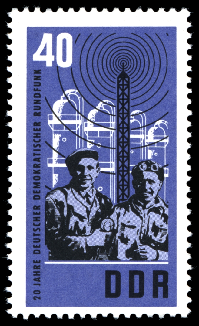 Information Information: Ausgabepreis: Pfennig First Day of Issue / Erstausgabetag: Auflage: Entwurf: Druckverfahren: Michel-Katalog-Nr: Ländercode-MiNr